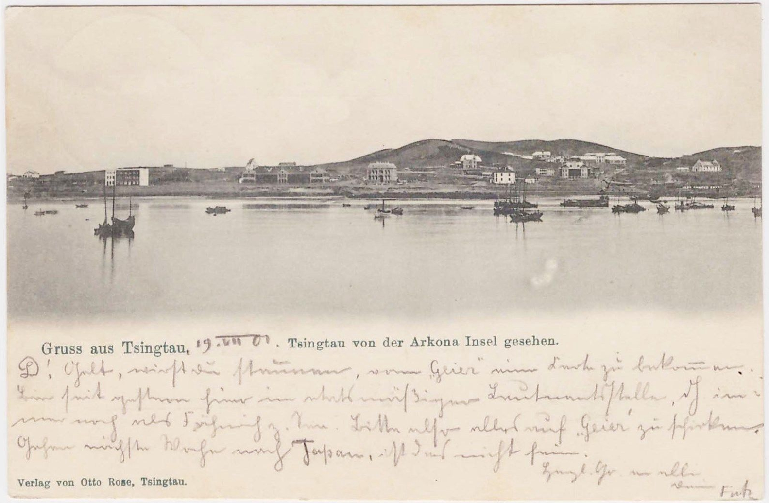 青岛太平路德租时期海上远景